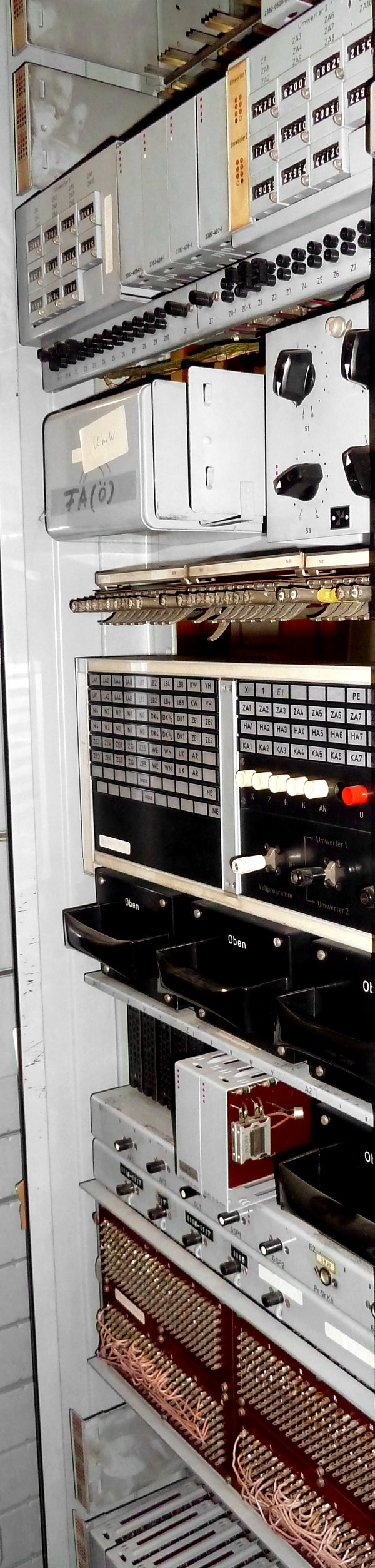 Umwerteranlage aus dem Fernwahlsystem T62